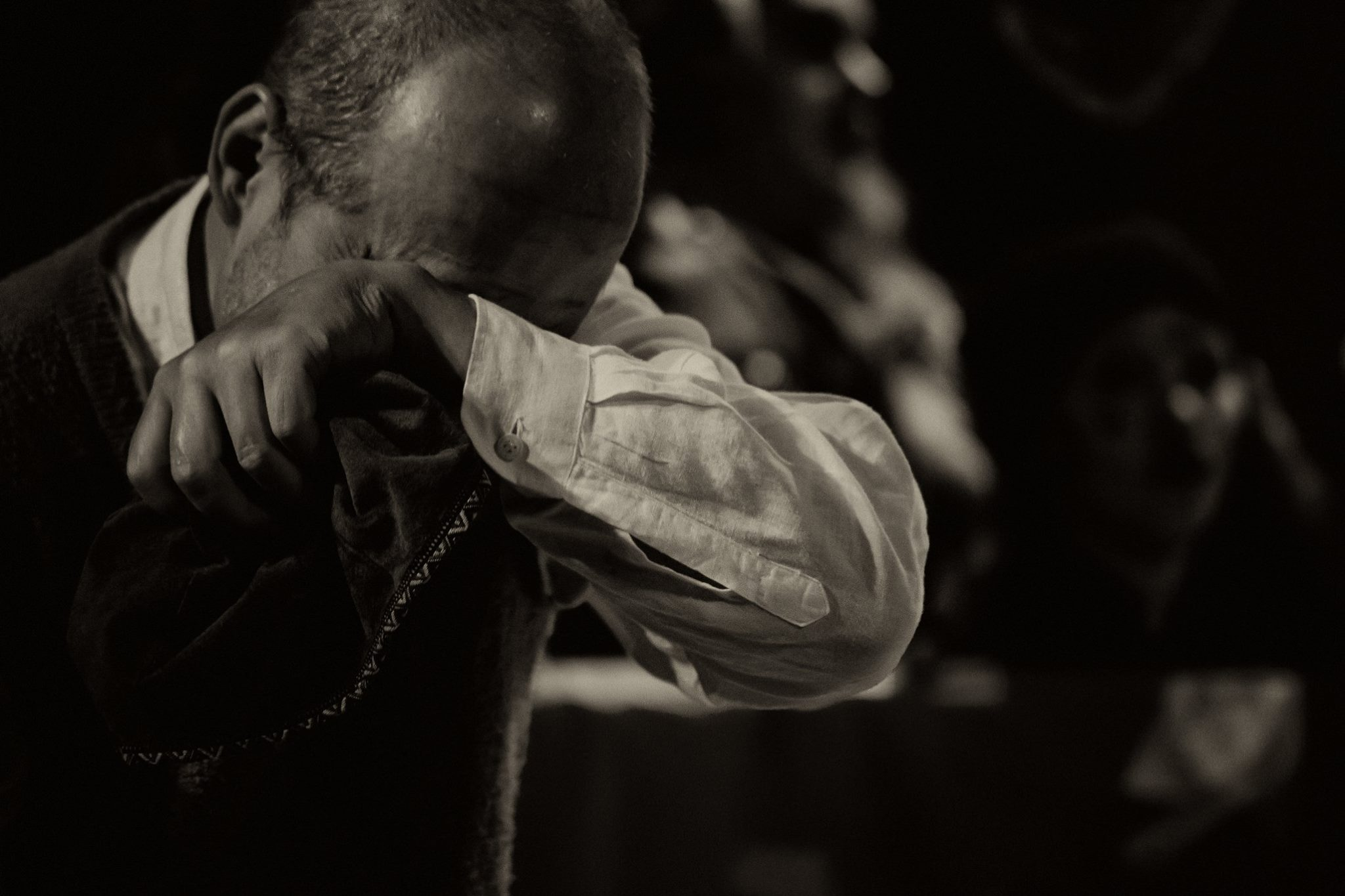 Trecho de "O Mercador de Veneza". Ator: Ronaldo Marin Foto: Ana Souza